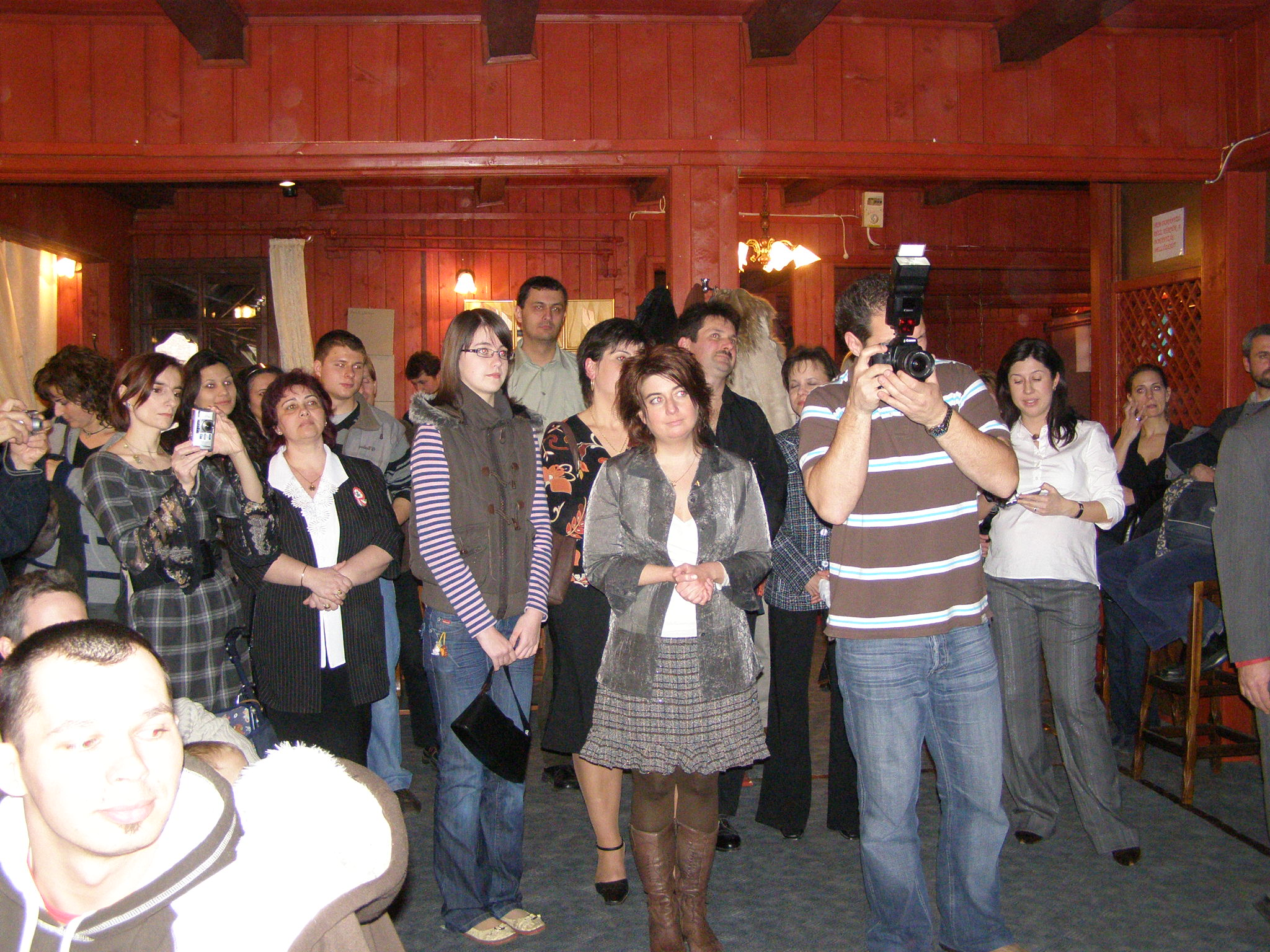 Hamza Studio-Úton, Jászberény